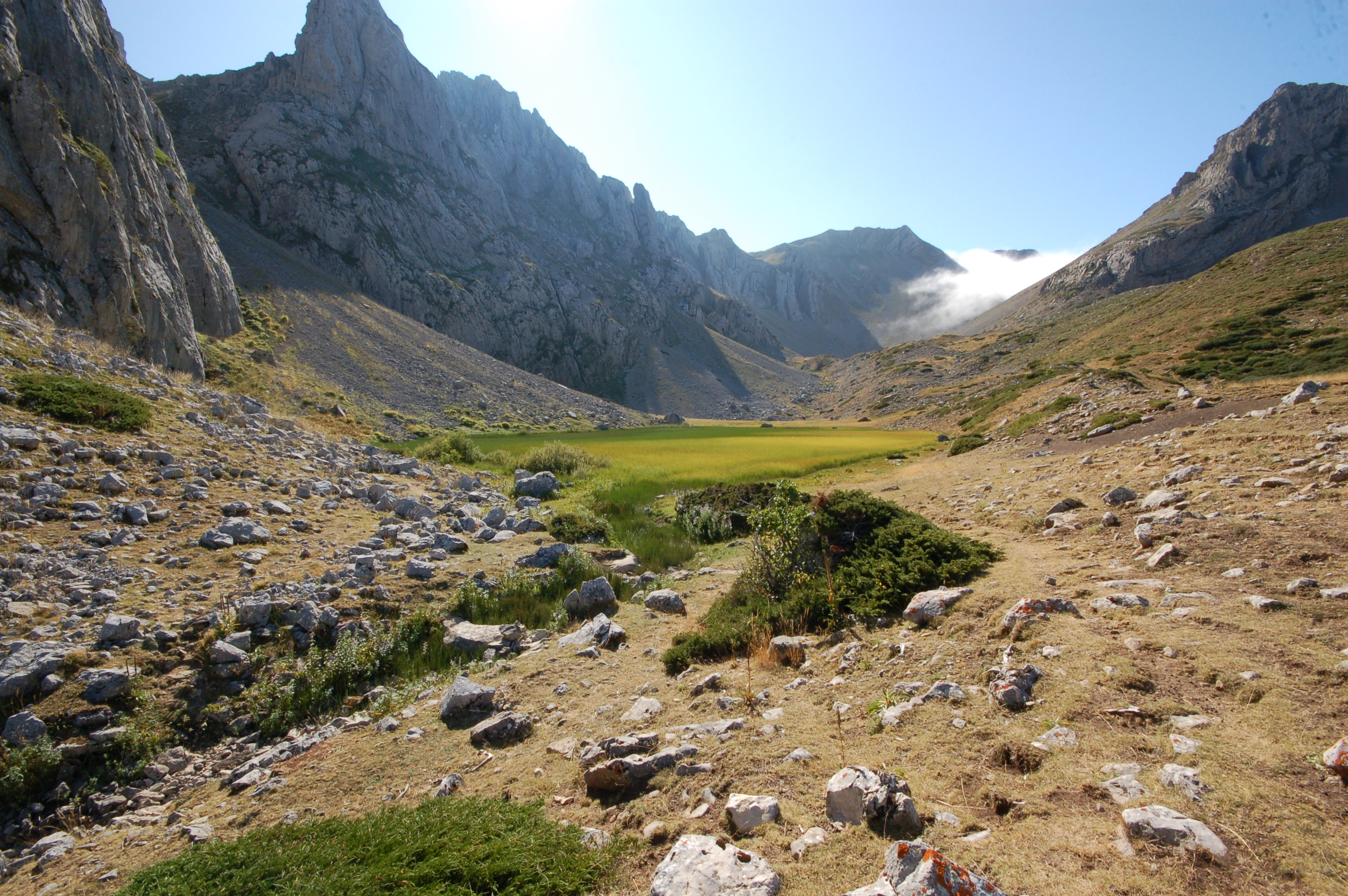 Lago de Babia.